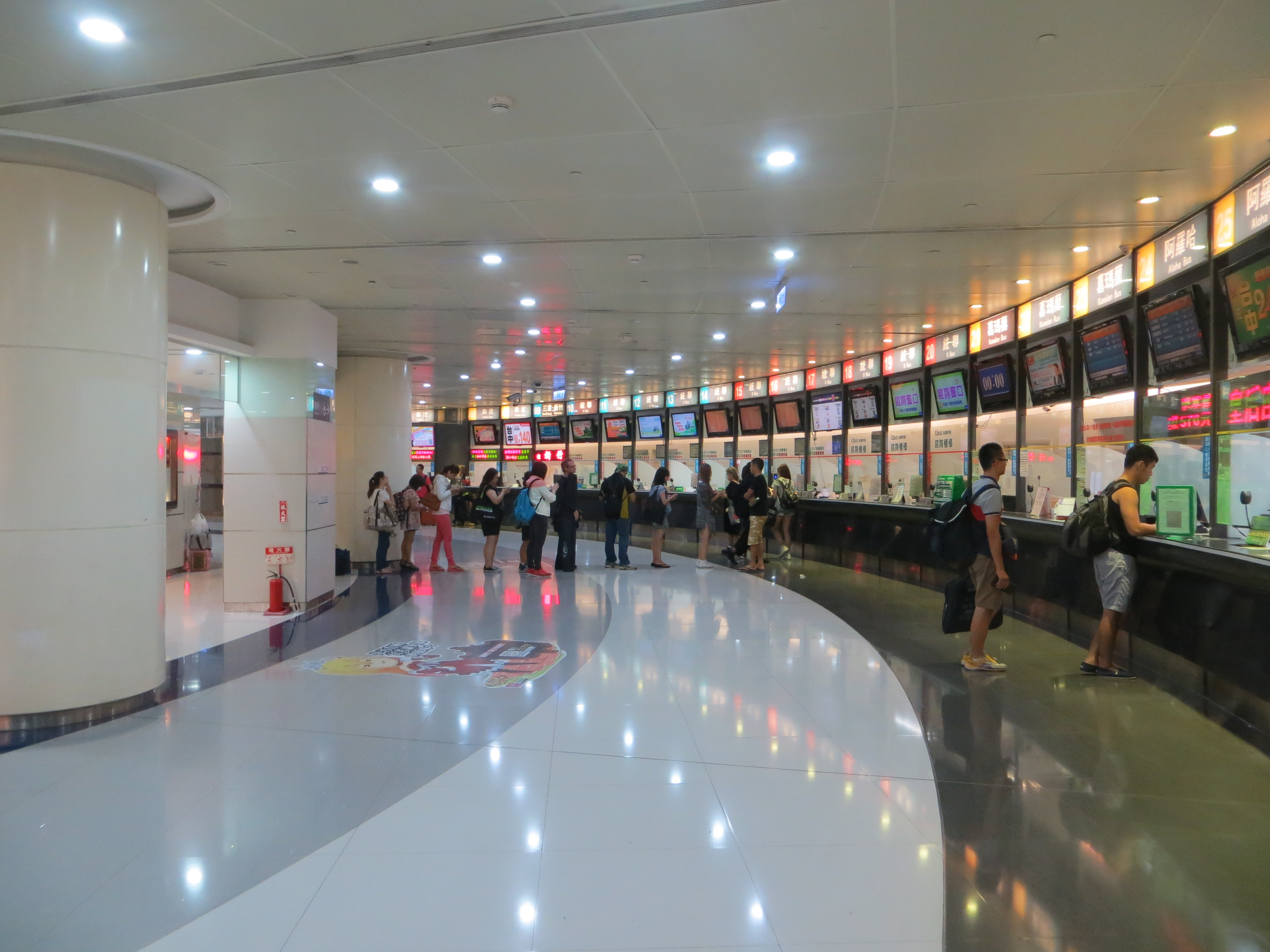 台北轉運站售票區設於一樓，當時除葛瑪蘭客運當日票須上四樓購買外，其他客運路線車票（含當日、預售、網購）皆在此販售。2015年8月5日攝，此時已近午夜。